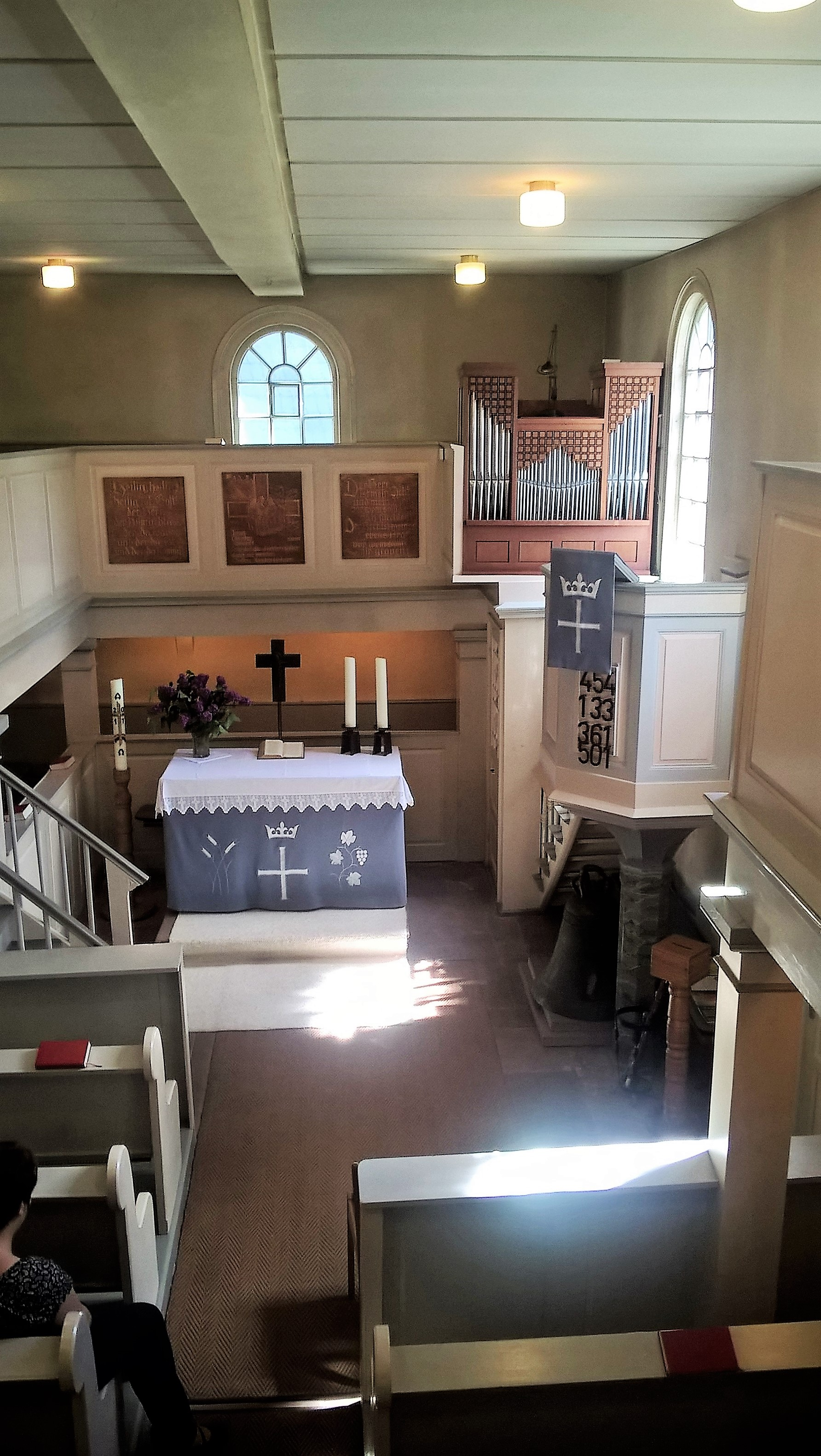 Evangelische Kirche Römershausen (Gladenbach), Landkreis Marburg-Biedenkopf, Hessen, Deutschland